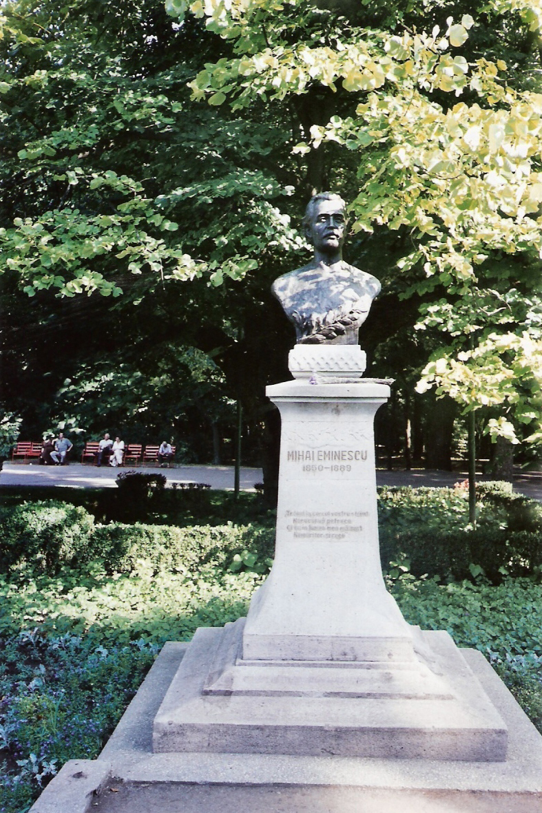 Statue of Mihai Eminescu, Iaşi, Romania